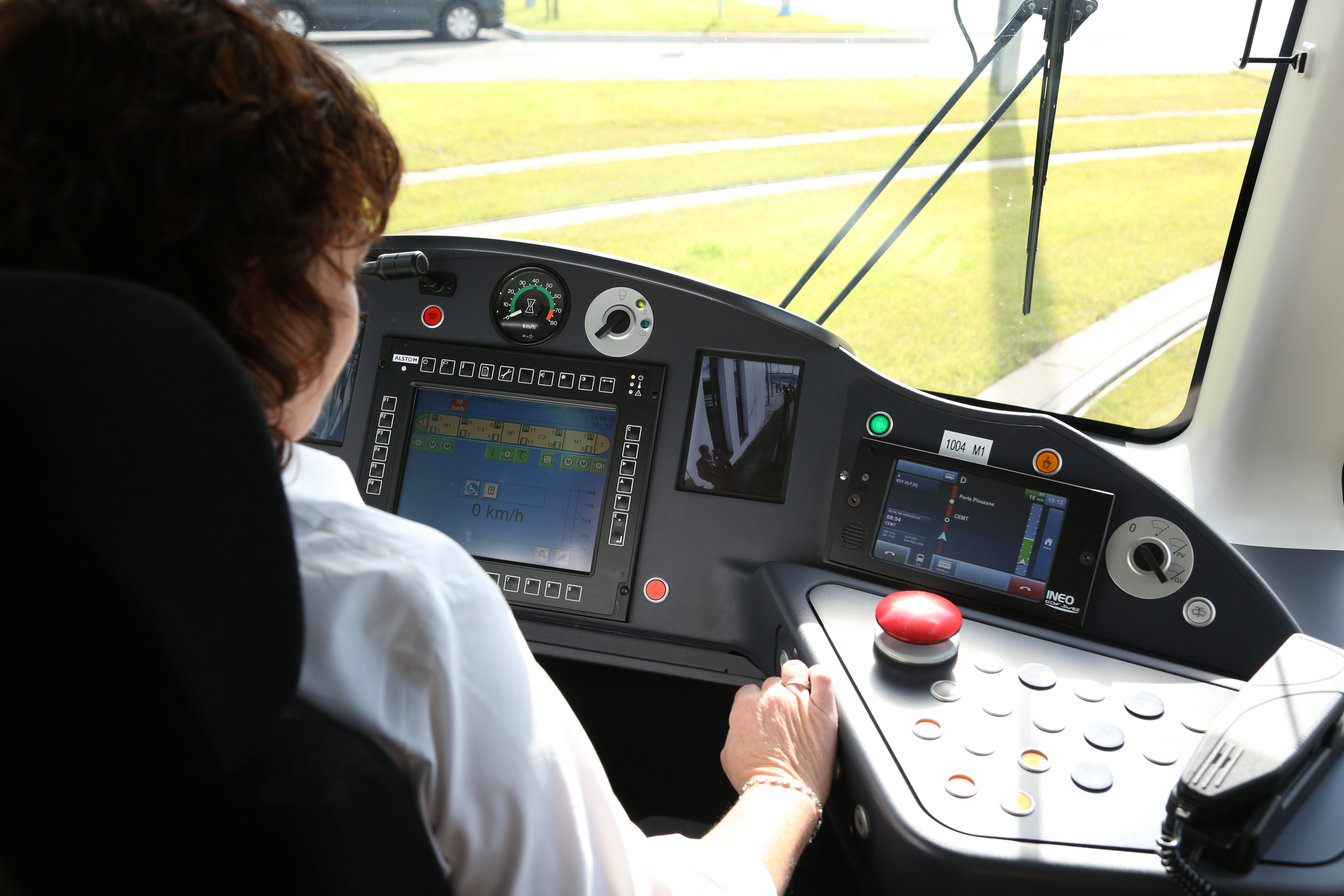 Photos autour de l'inauguration du Tramway à Brest le 23 juin 2012 Les premiers mètres du tramway d'inuaguration